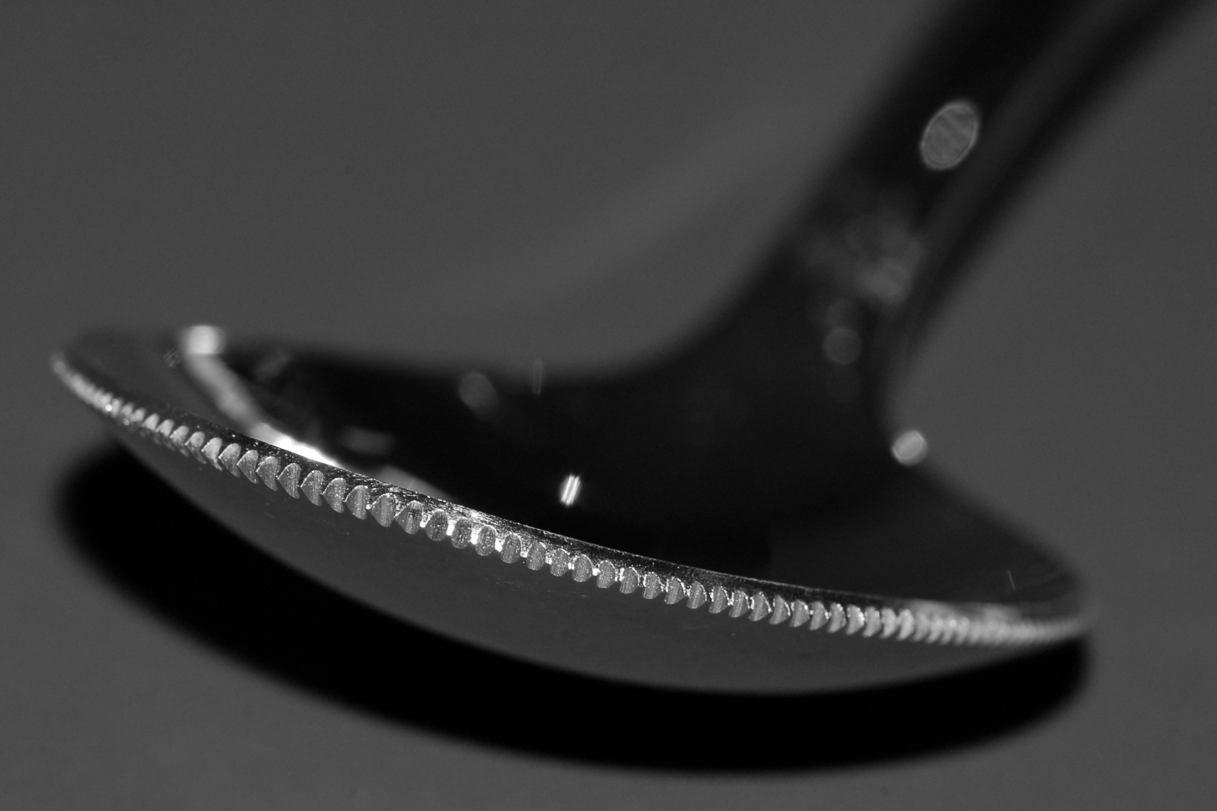 Laffe des Kiwi-Löffels von WMF aus der Besteckserie Luzern